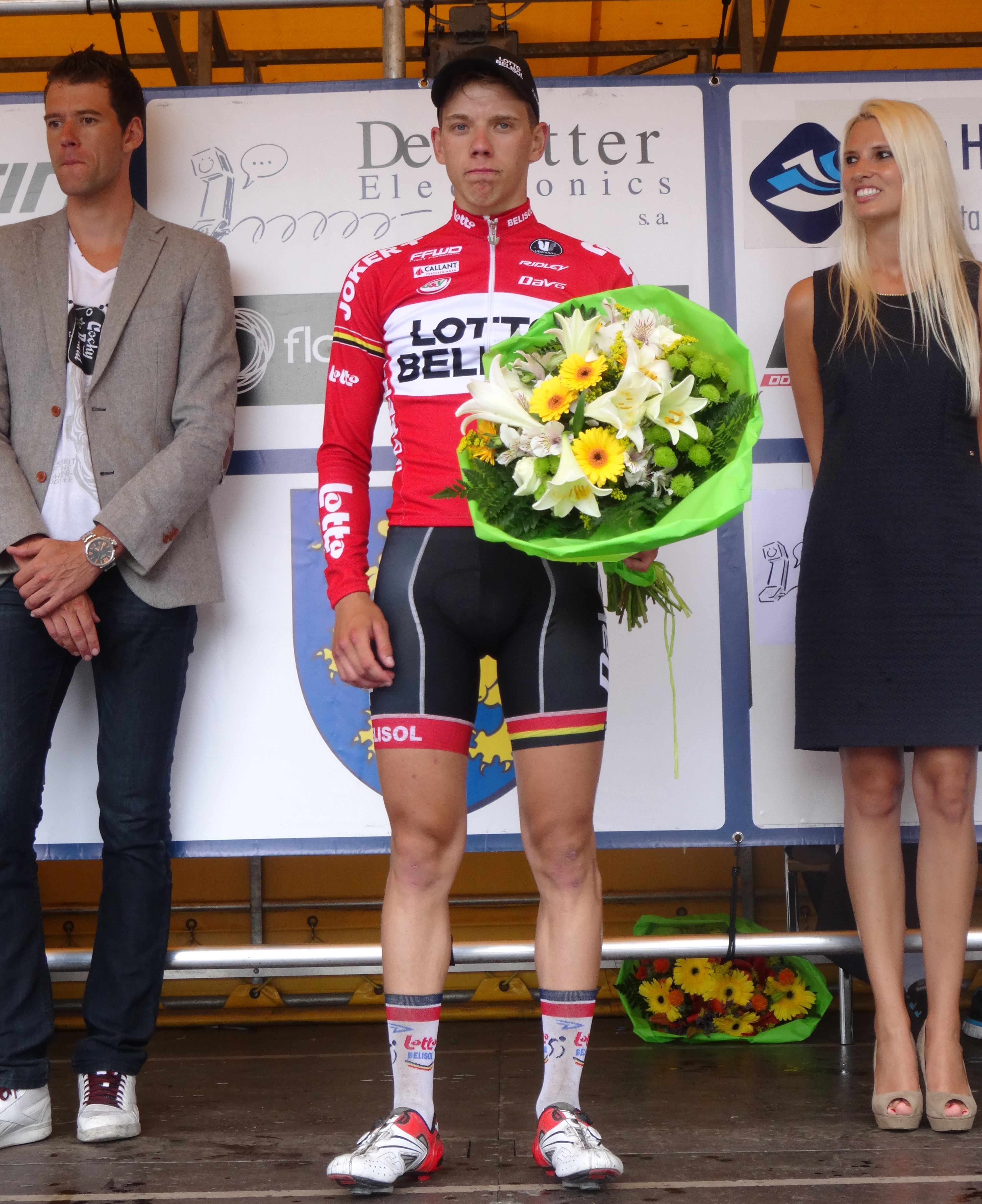 Reportage photographique réalisé le samedi 5 juillet à l'occasion du départ et de l'arrivée du Circuit Het Nieuwsblad espoirs 2014 à Grotenberge (Zottegem), Belgique.